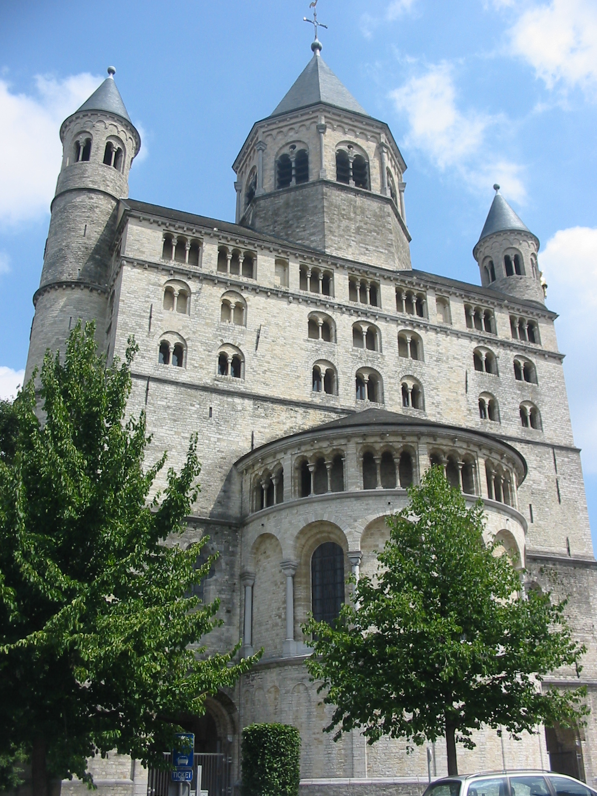 Belgium, Nijvel (Nivelles), Main Church